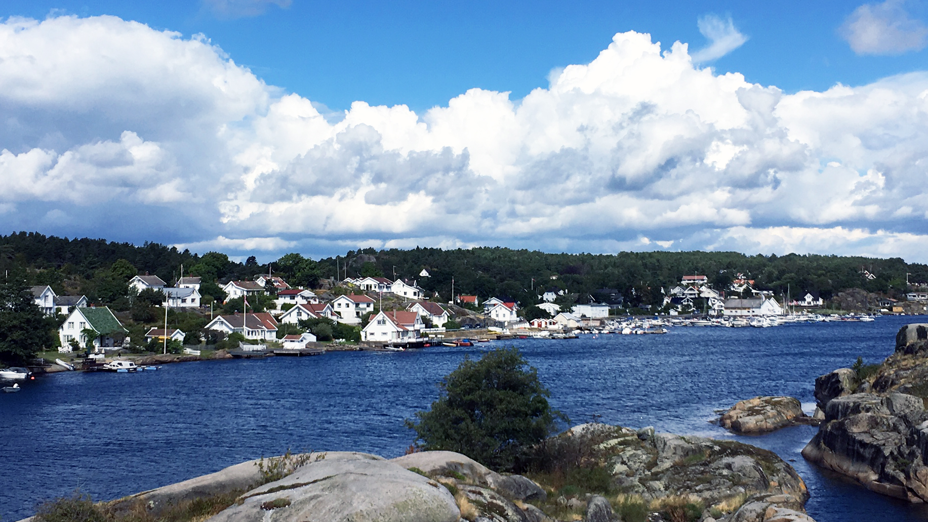 Ormelet sett fra Røssesund bru 2017